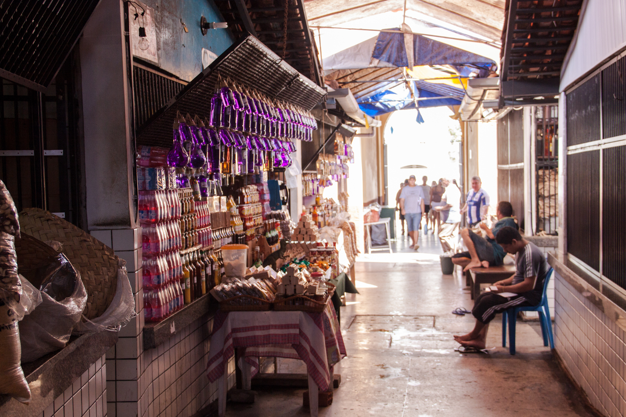 Foto: Mariana Costa